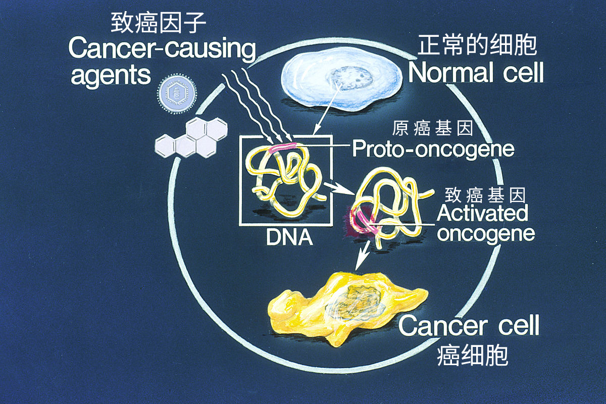 中文（中国大陆）: 致癌基因的图解